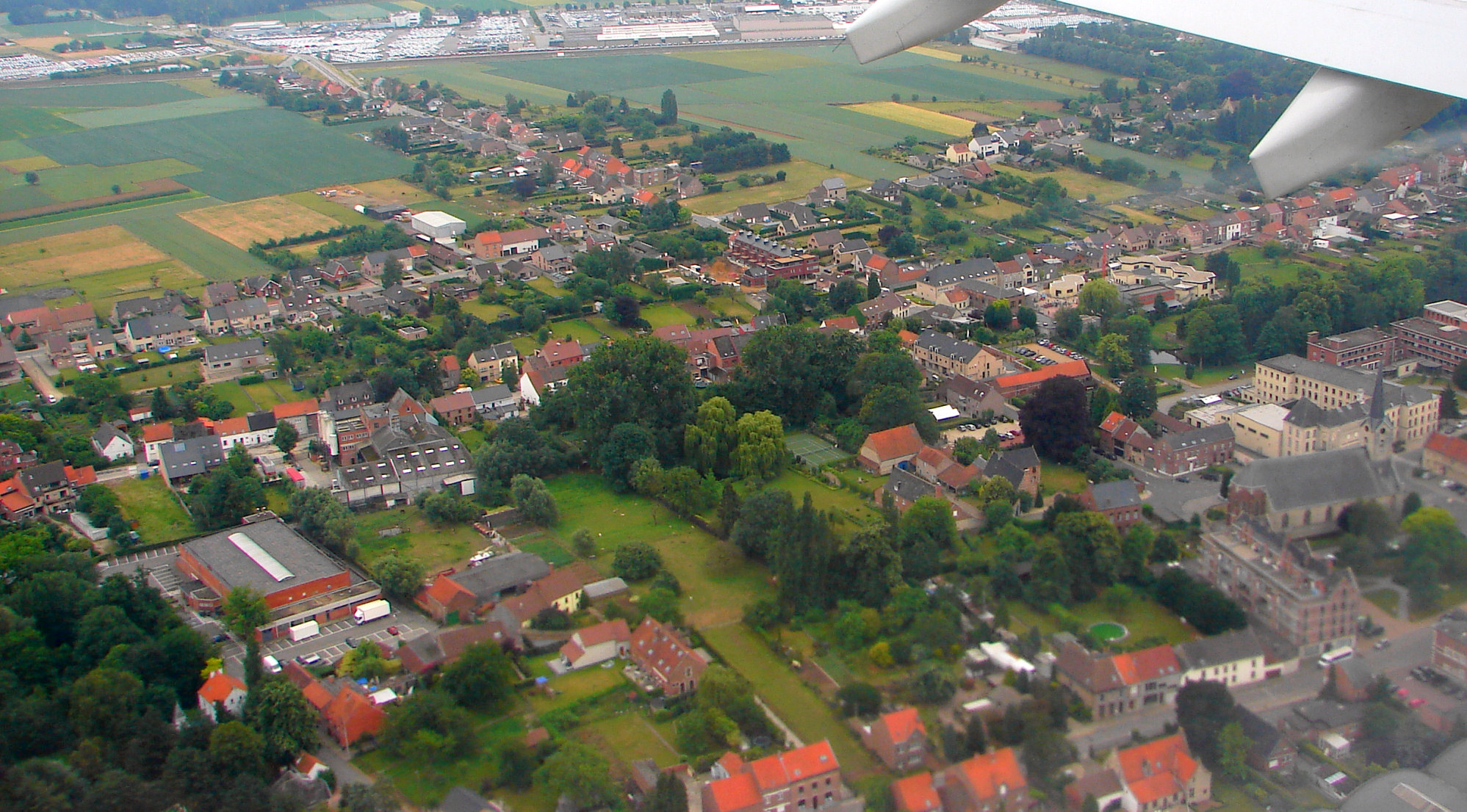 Erps-Kwerps, Belgium